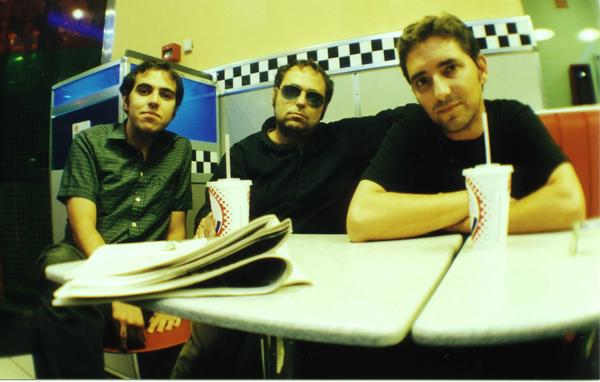 Los Hermanos Dalton, de izquierda a derecha, Jesús, Josema y Carlos.